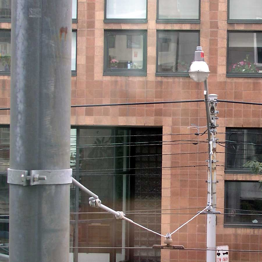 La simplicité d’un fil de trolley pour l’alimentation électrique d’un réseau de tramways. Le fil de contact est simplement pincé au moyen de pinces isolantes suspendues à des poteaux de part et d’autre de la chaussée.